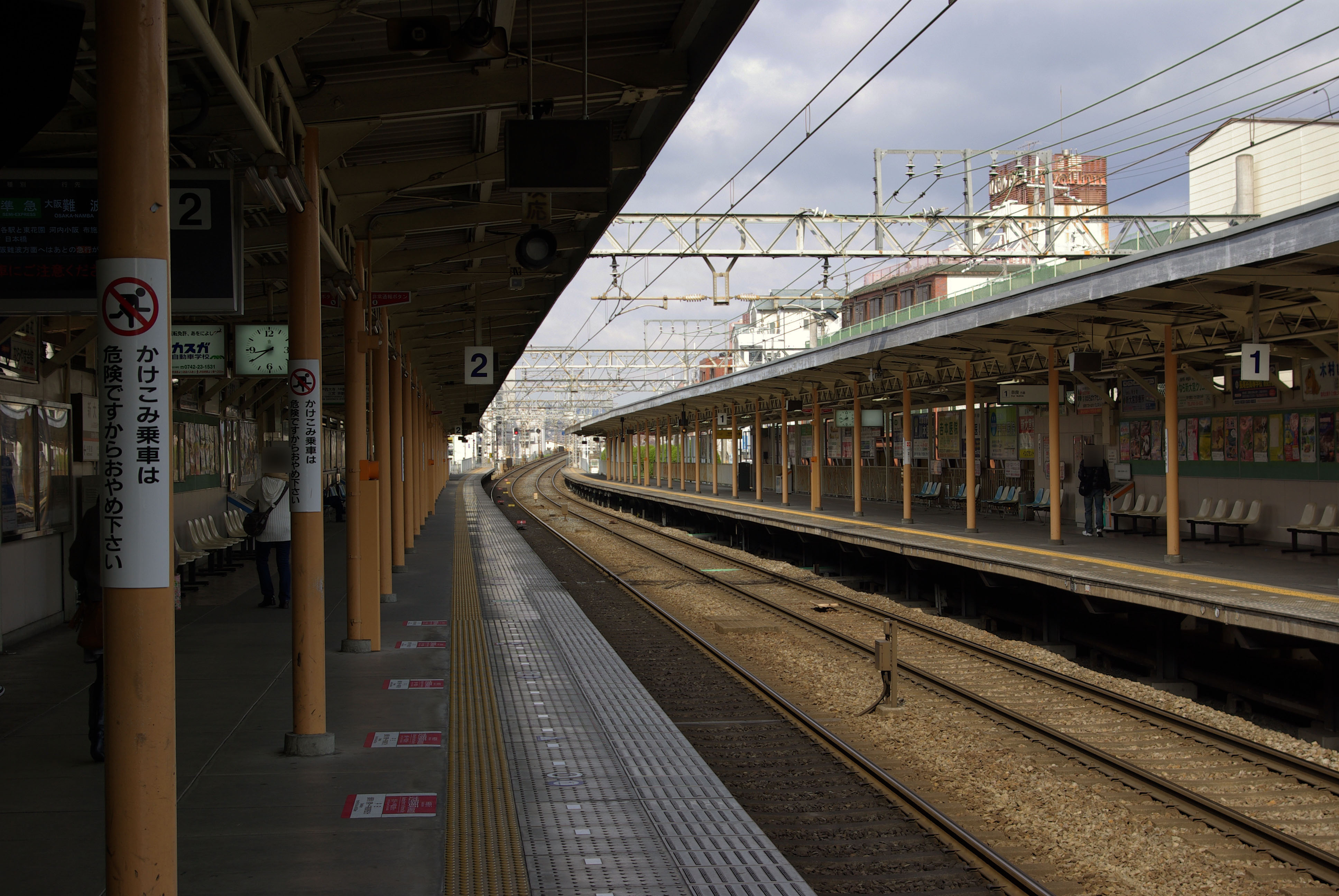 近鉄奈良線新大宮駅